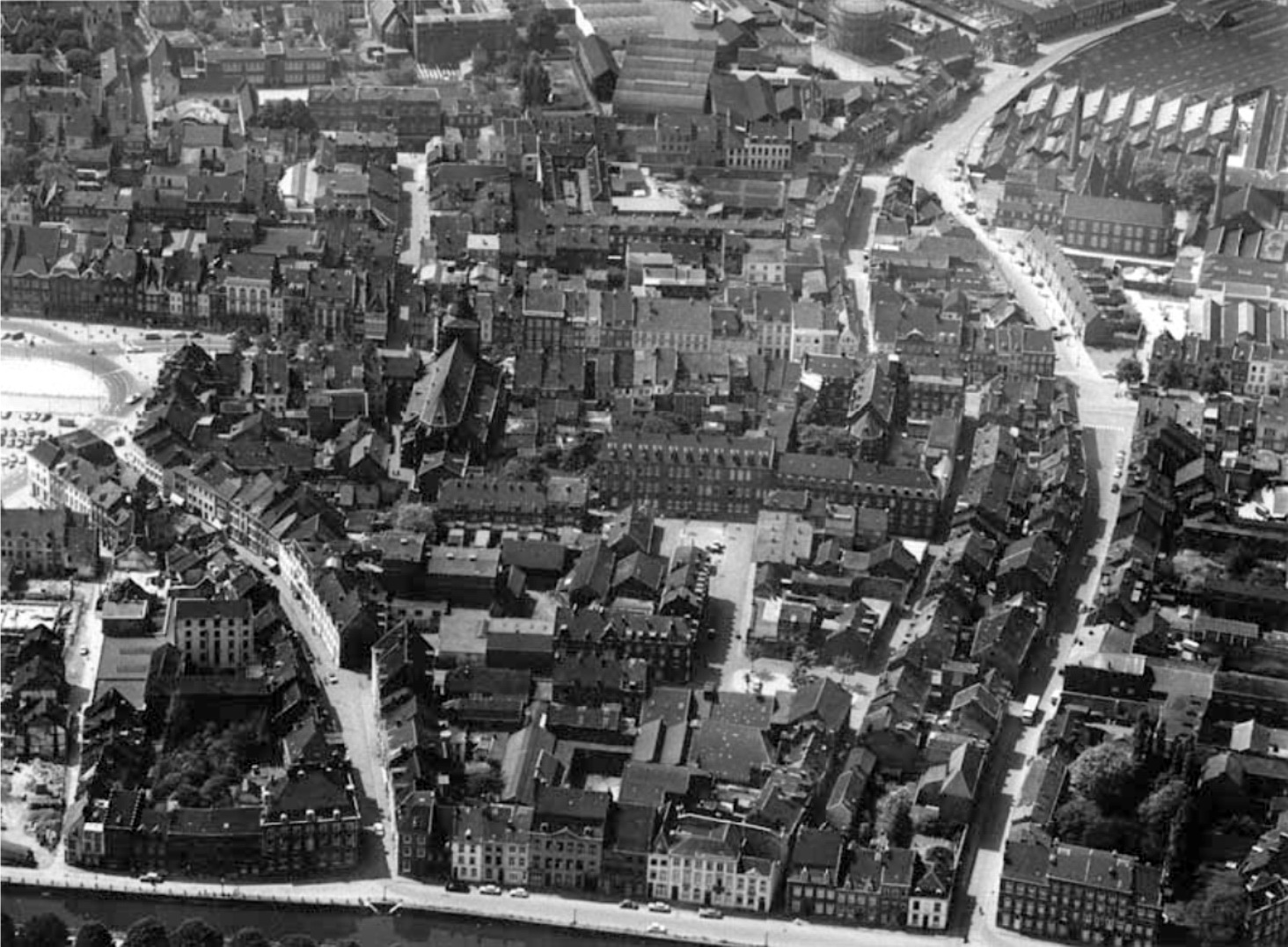 Luchtopname van het Boschstraatkwartier in Maastricht in 1961, vóór de sloop. Fotocollectie RHCL Maastricht, GAM 8225.